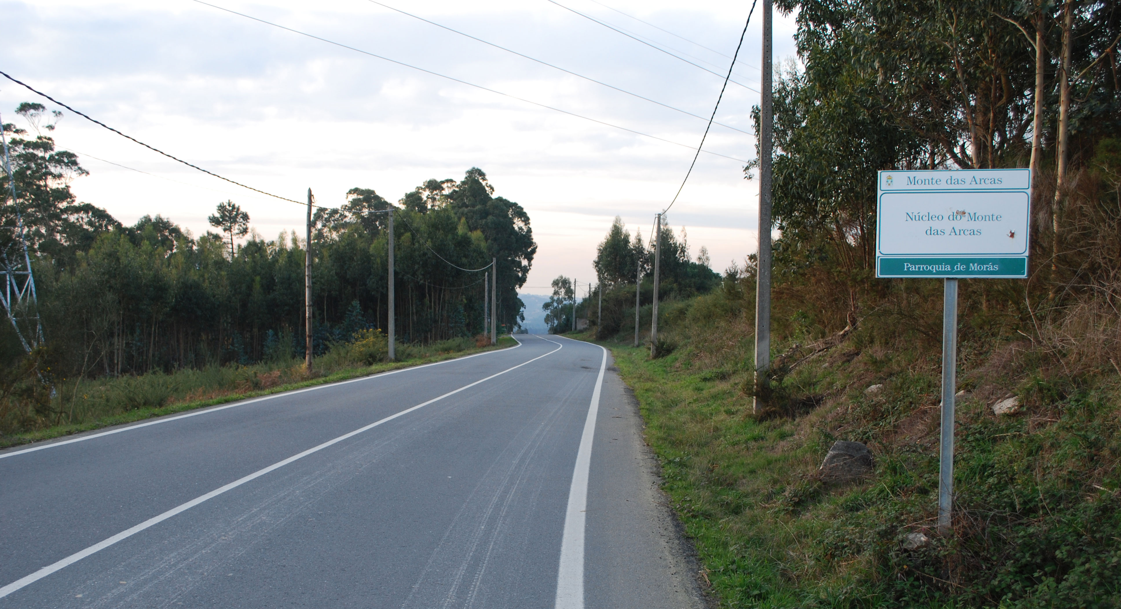 Monte das Arcas Morás Arteixo A Coruña Galiza Spain